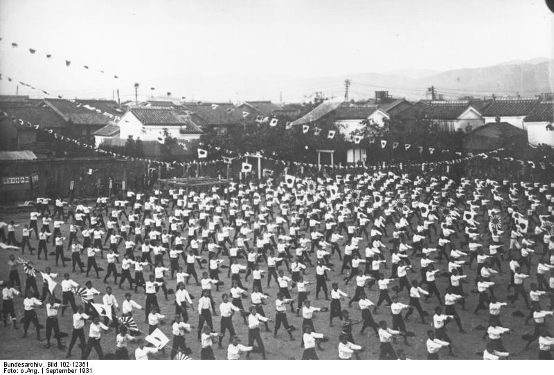 Modernes Japan ! Japanische Schüler in Osaka bei Massenfreiübungen auf einem Sportfest, welches nach europäischem Muster abgehalten wird.